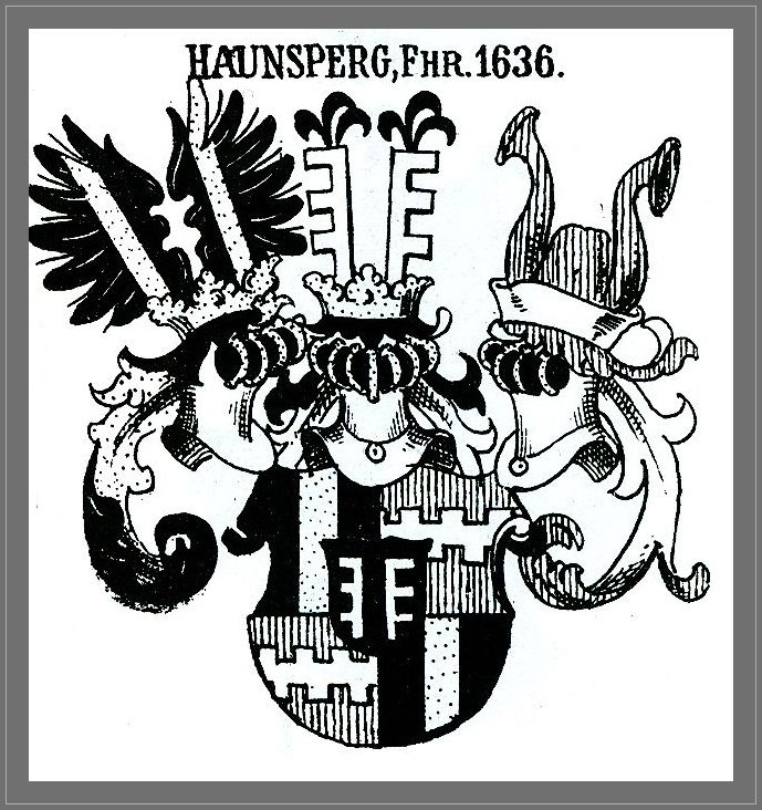 Freiherrliches Wappen der Haunsperger von 1636